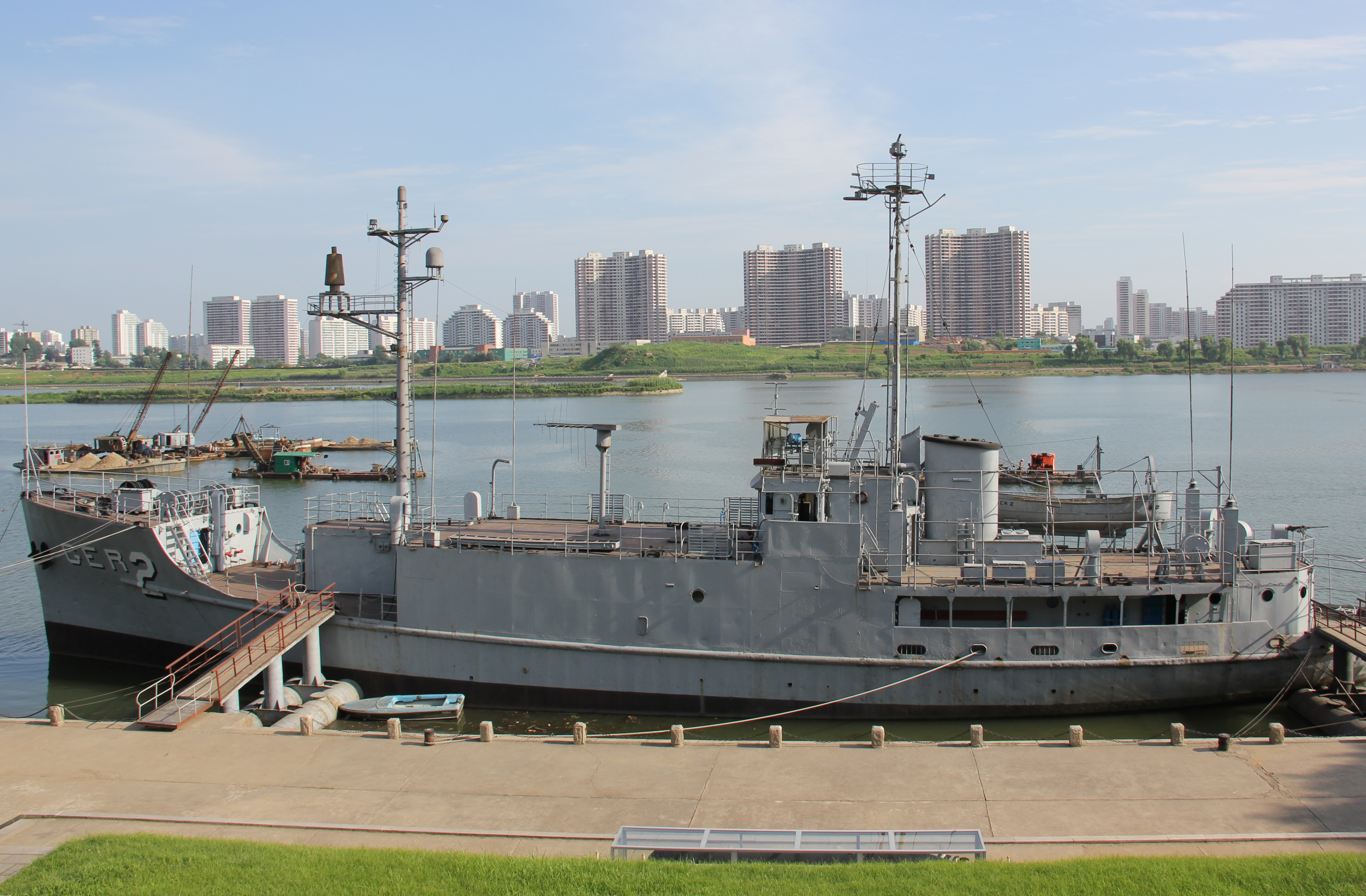 USS Pueblo